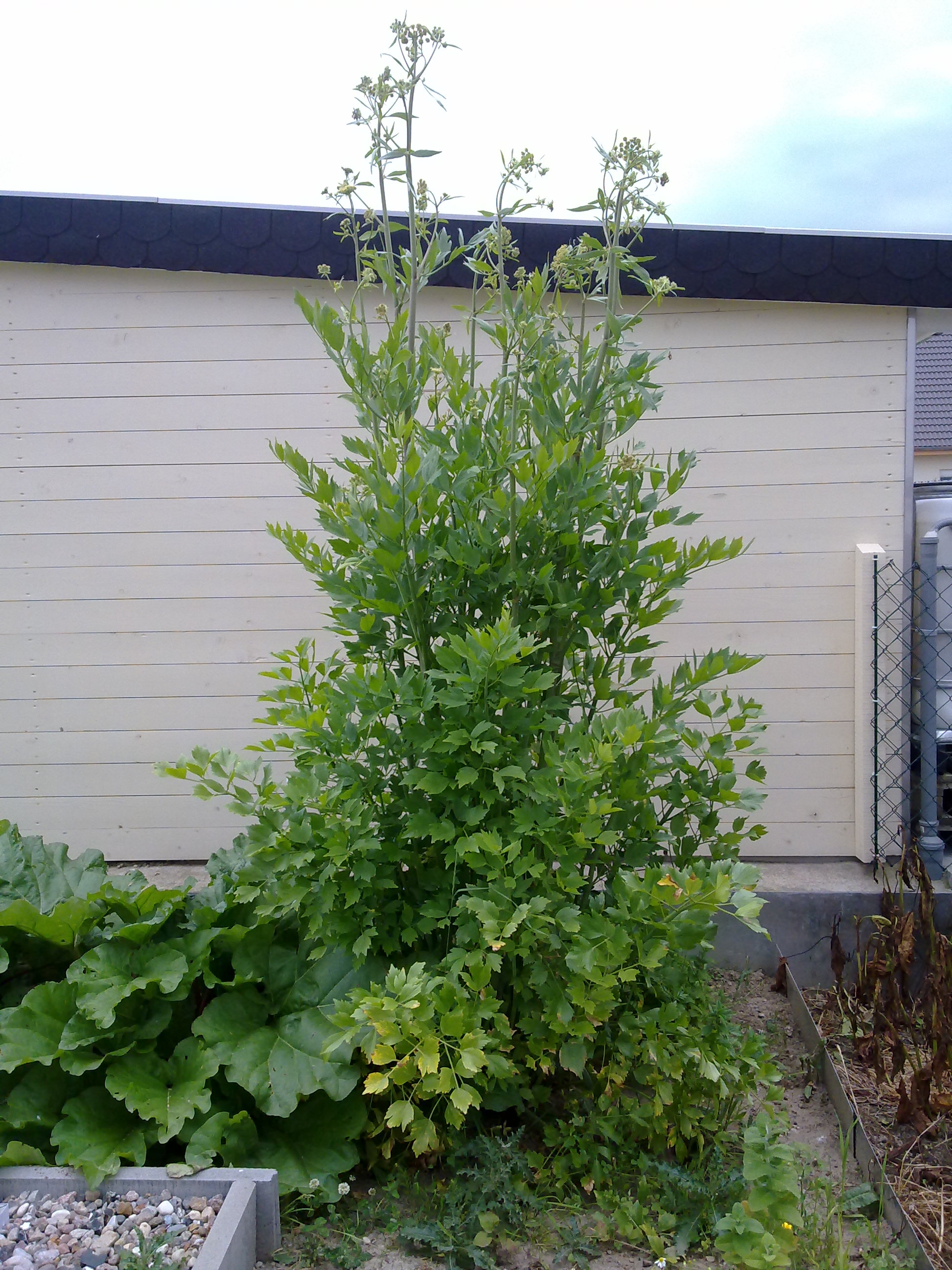 Unser Liebstöckel 2010 - Höhe: 2,78m